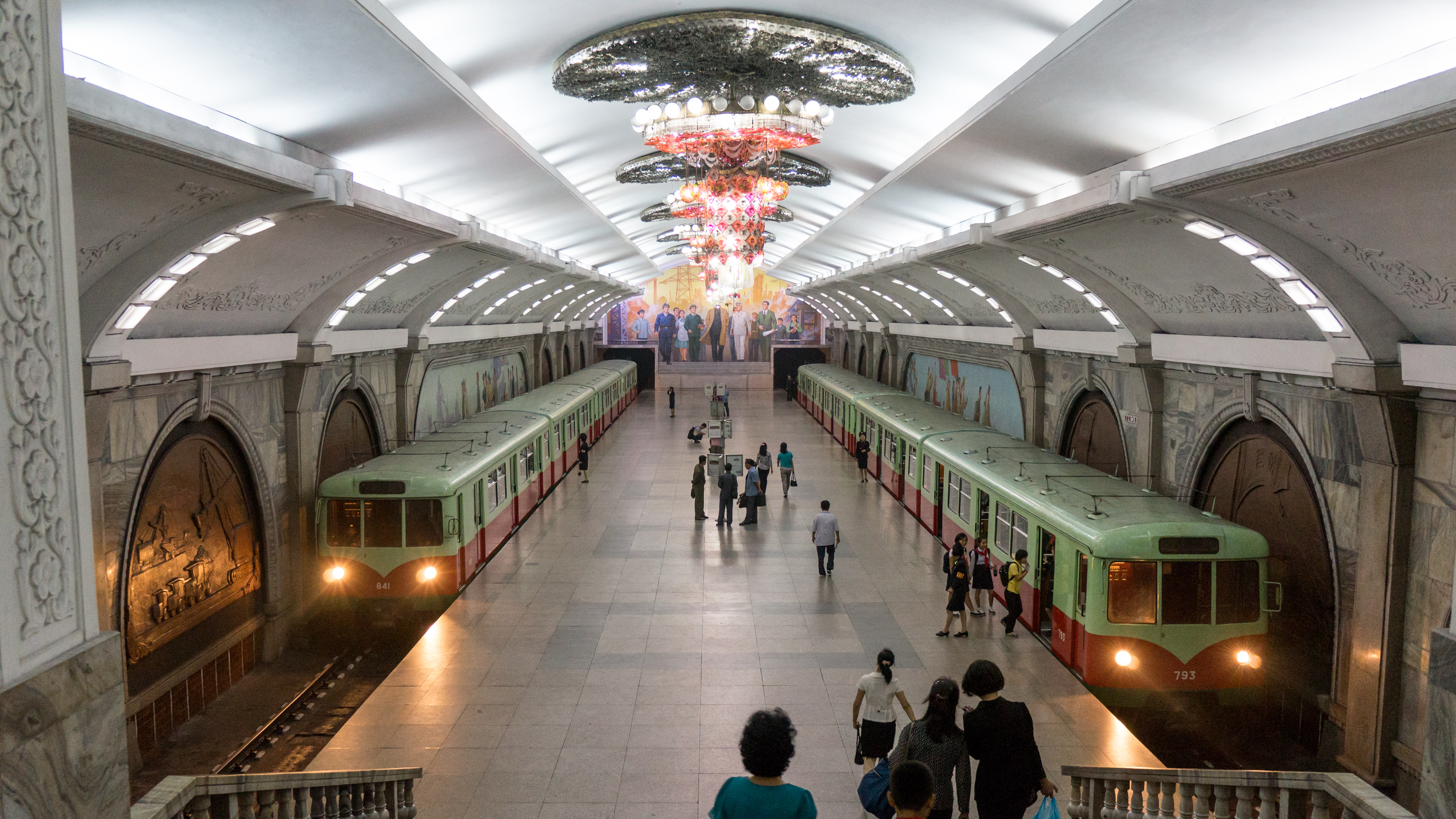 Pyongyang Metro